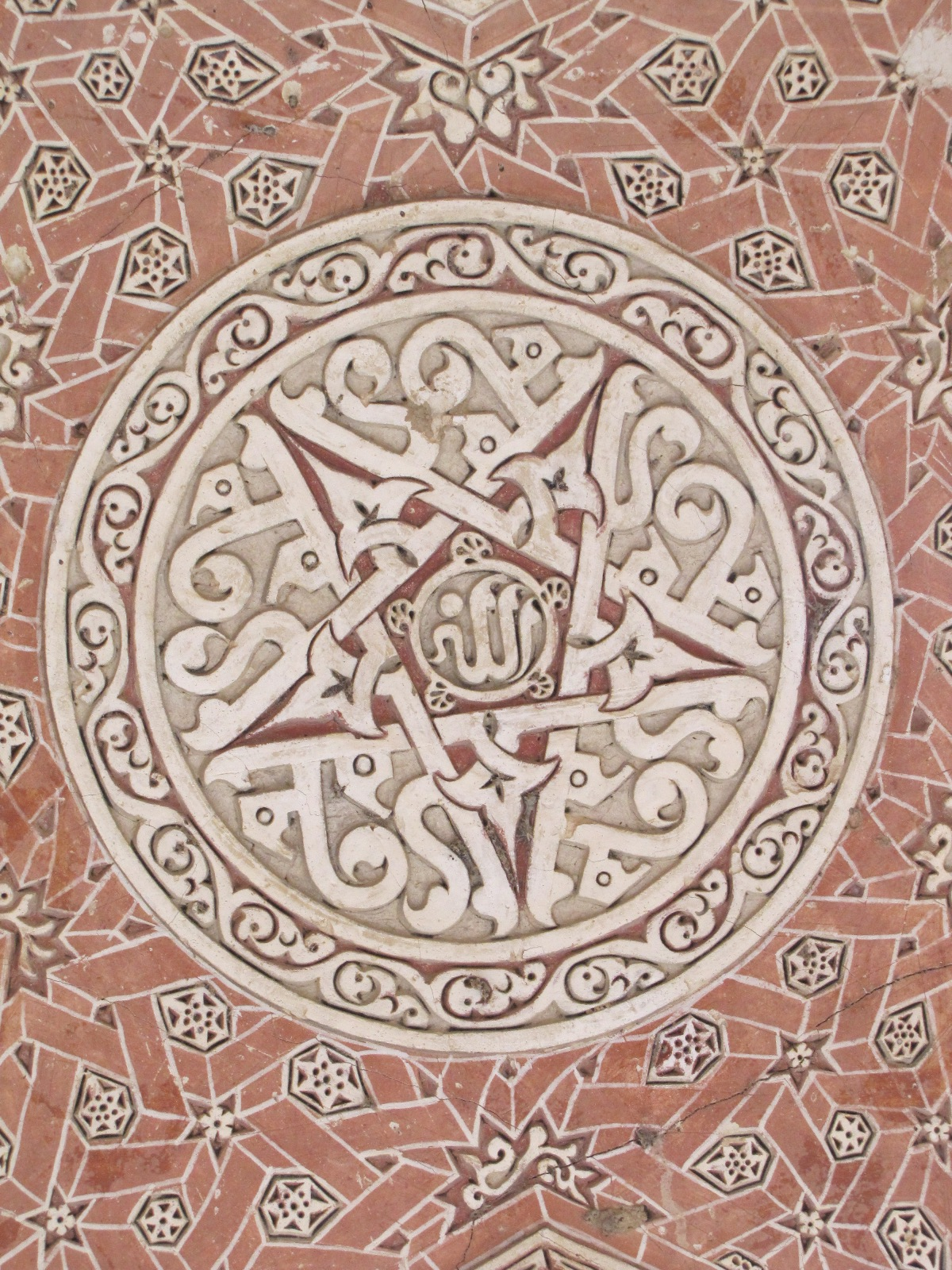 Soltaniye